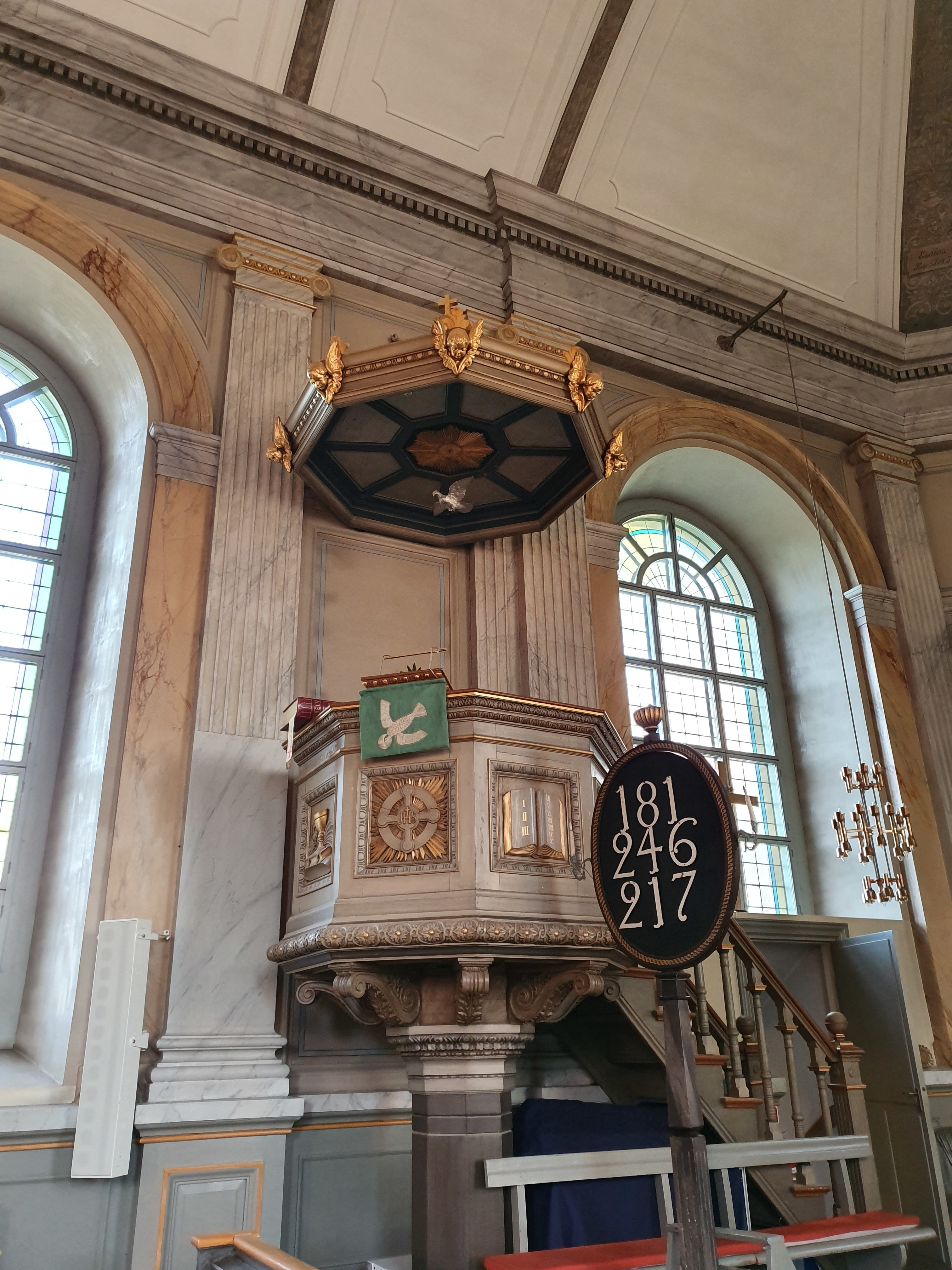 Predikstolen i Vaxholms kyrka